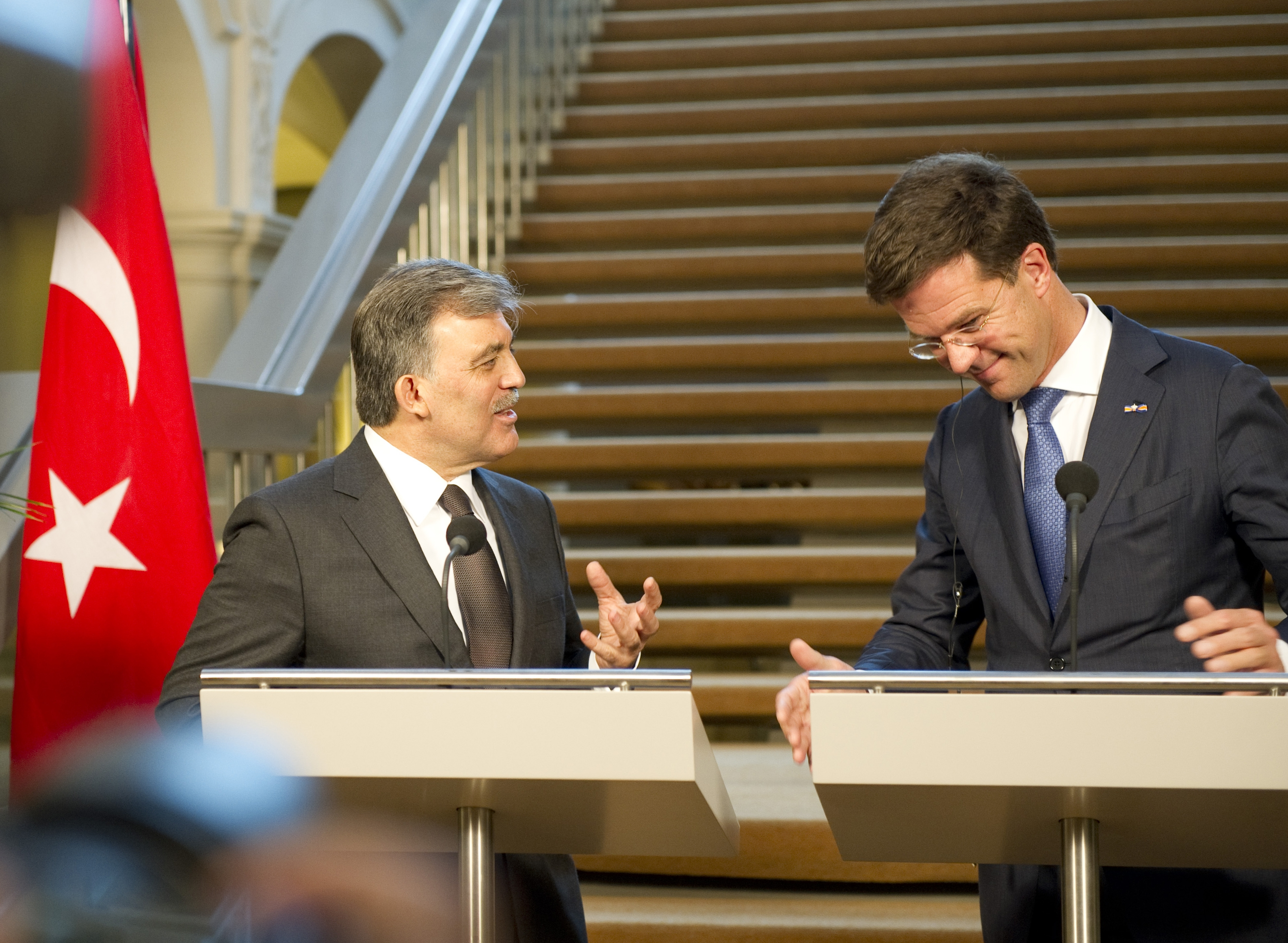 Minister-president Rutte en president Gül geven een persconferentie na afloop van hun gesprek in het Torentje. Op uitnodiging van de Koningin brengen de president en zijn echtgenote van dinsdag 17 tot en met donderdag 19 april een staatsbezoek aan Nederland.